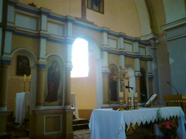 Kobylnica Wołoska - widok na ikonostas cerkwi św. Dymitra